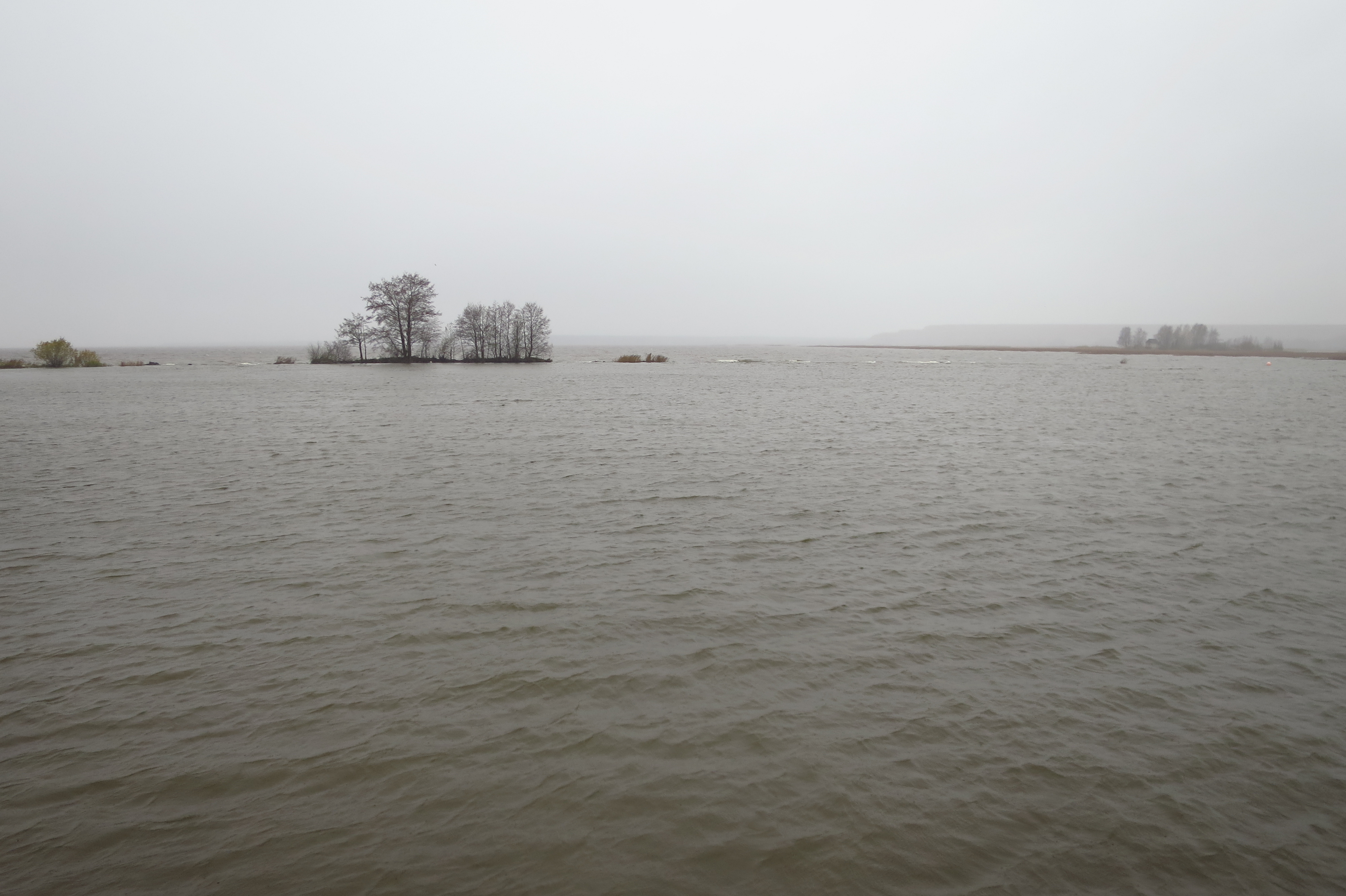 Narva veehoidla sügisel vaade Kulgu sadama kohalt